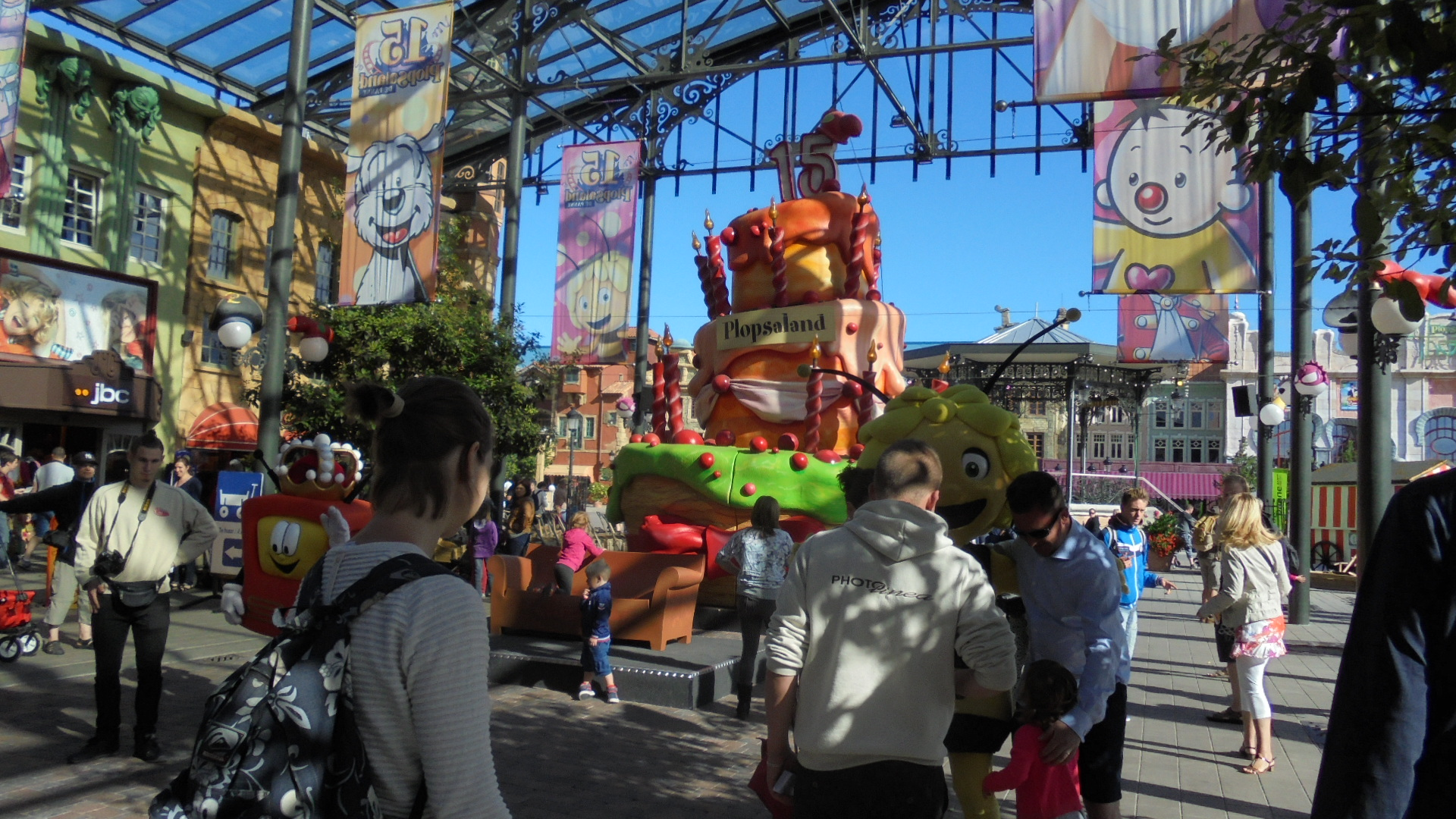 Ingangzone Plopsaland De Panne (in het park)